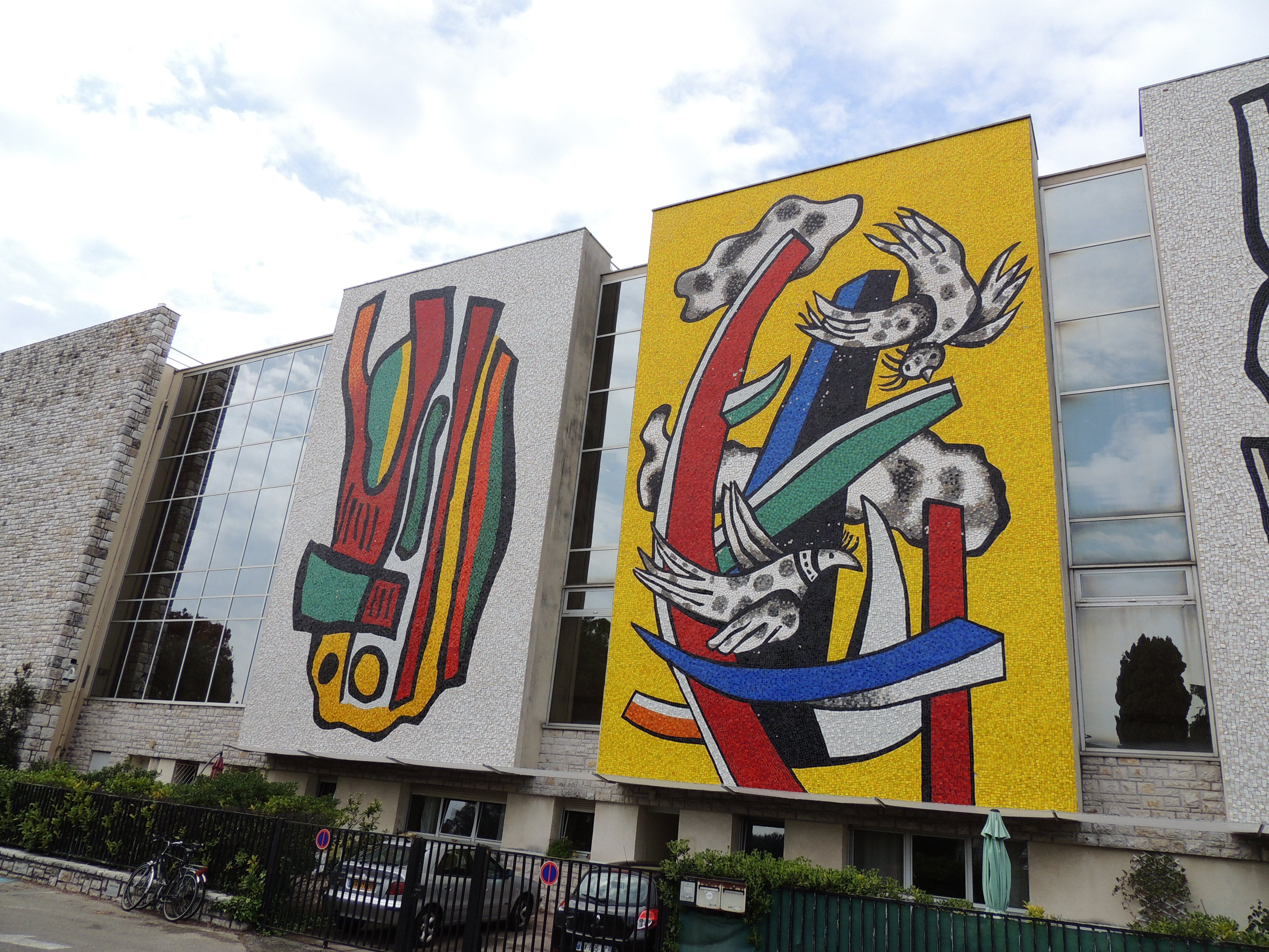 musée F Leger